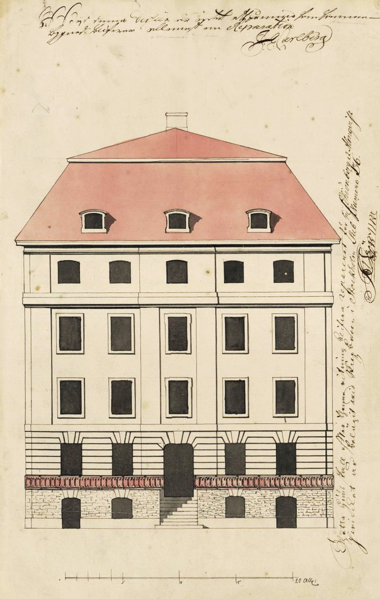 Ombyggnadsritning för huset Skeppsbron 46. Thetta huus skall efter thenna ritning blifva reparerat för Hr. Schiönborg et Almqvist, hvilket är beläget vid Skiepsbroen i Stockholm Sub Numero 36.